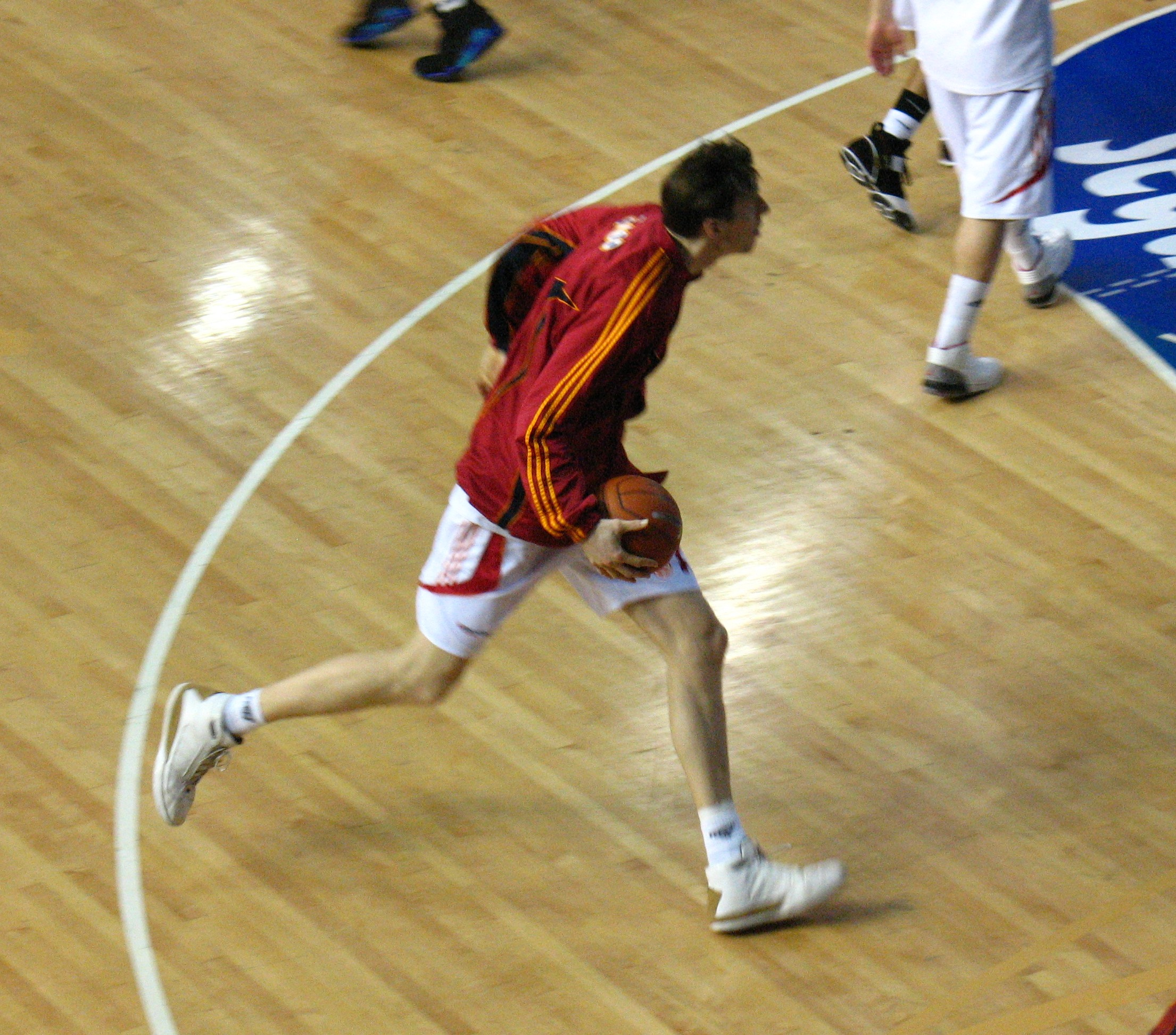 Gregor Fucka en un partido que enfrentó al FC Barcelona y el Lottomatica Roma de Euroliga en Febrero de 2008.